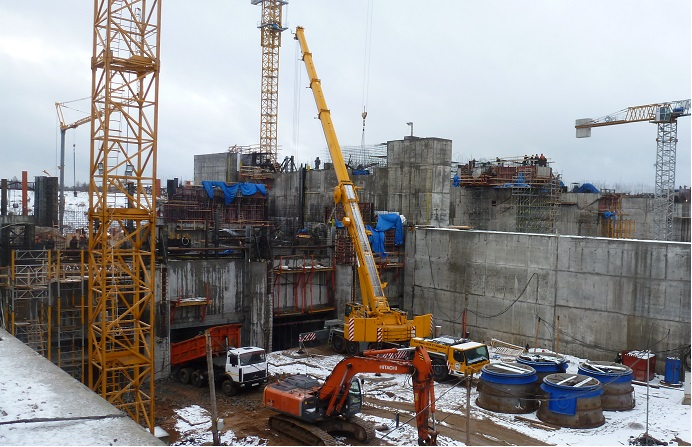 Строительство Полоцкой ГЭС